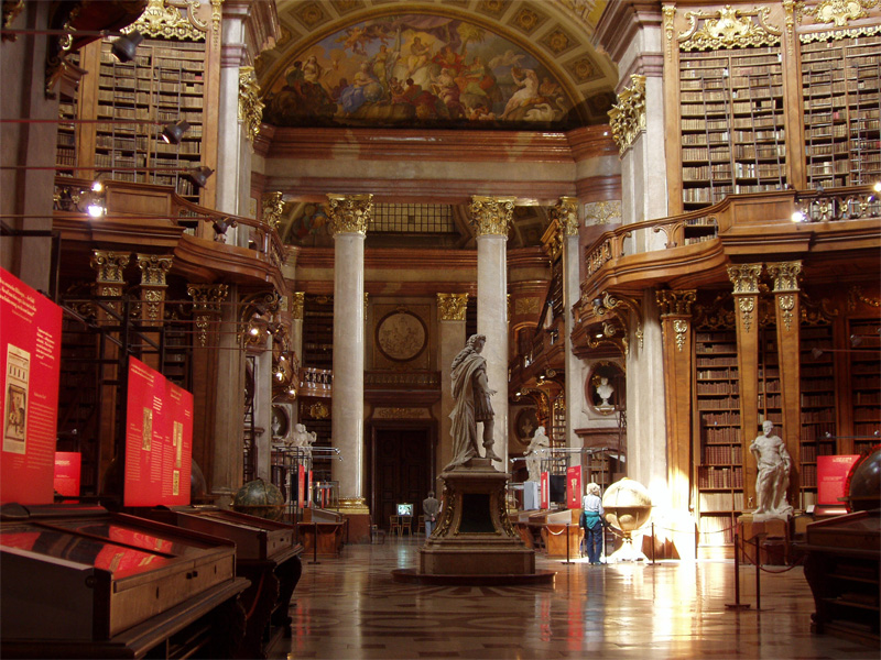 Barocker Prunksaal der Österreichischen Nationalbibliothek in Wien